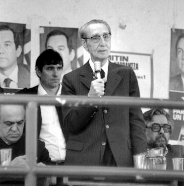 Leizaola Lehendakaria - The Lehendakari Leizaola.